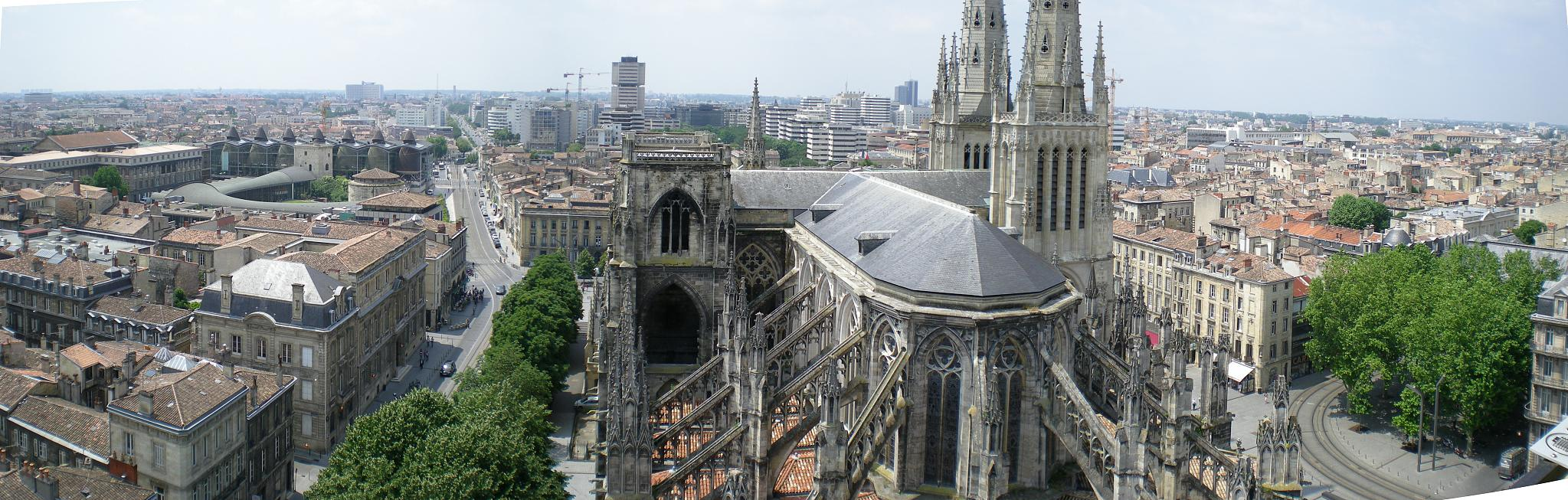 Bordeaux